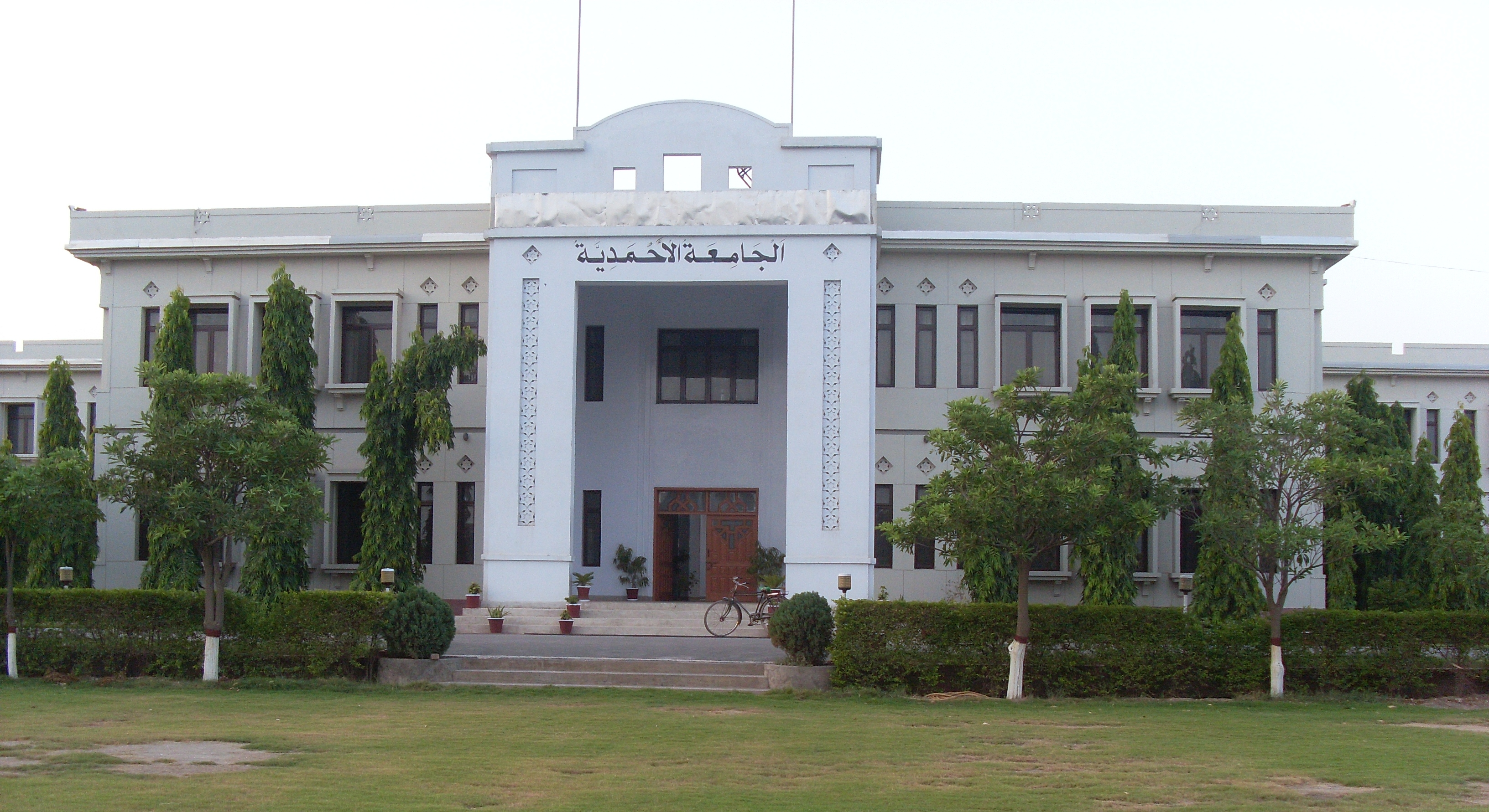 Die Jamia in Rabwah (theologische Schule der Ahmadiyya Muslim Jamaat)